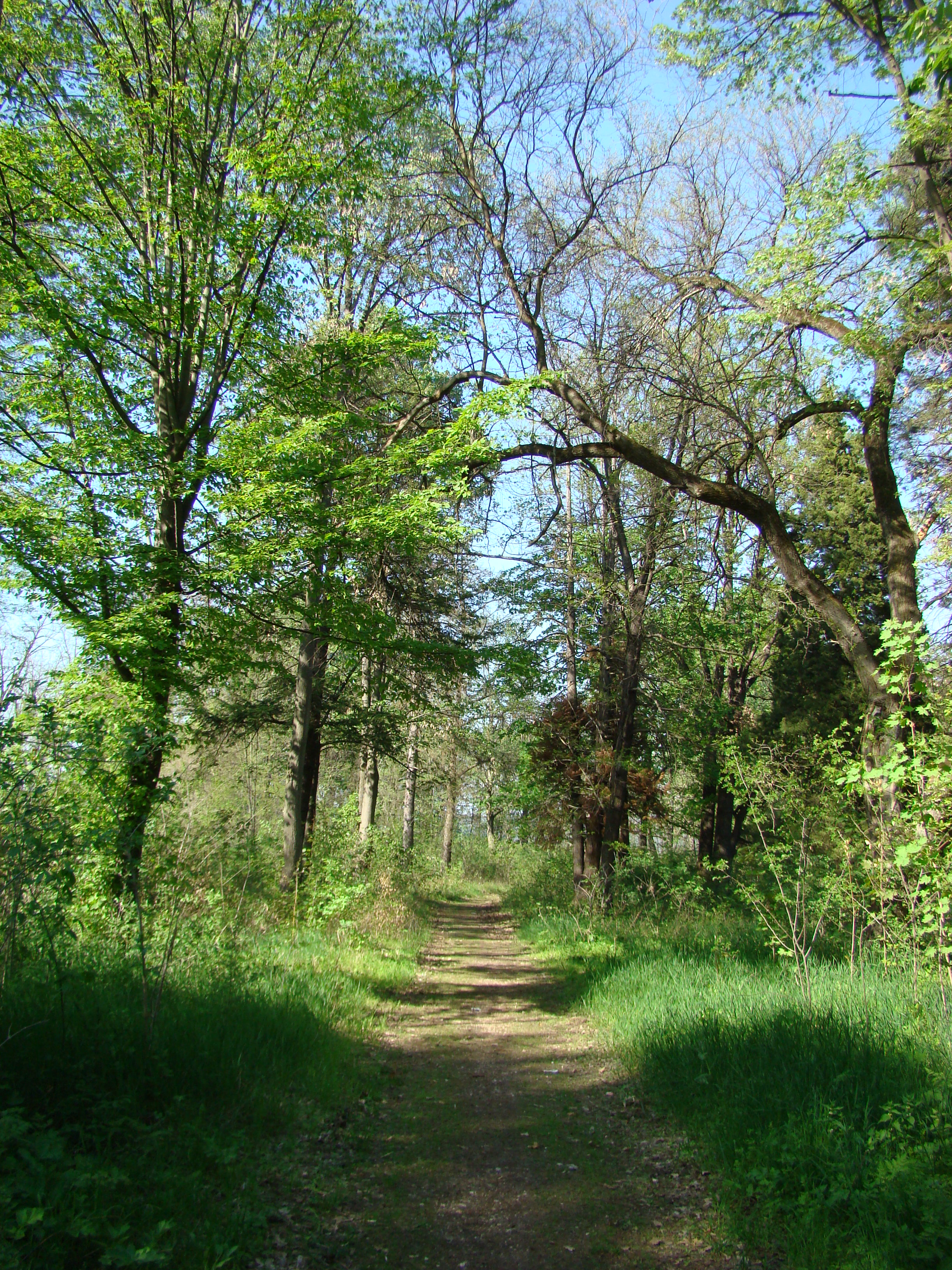 Ansamblul conacului Nalatzi-Fay, localitate componentă NĂLAŢVAD; oraş HAŢEG